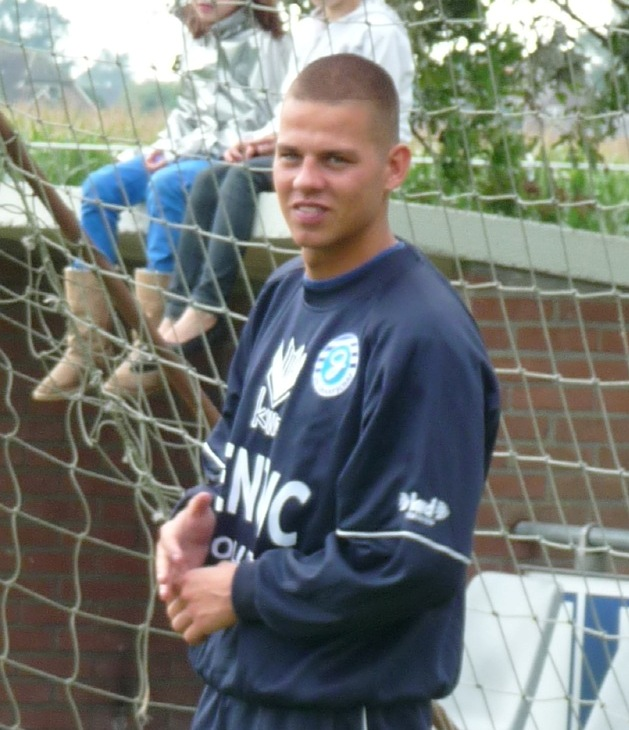 Kaye Coppoolse (3 januari 1991) is een Nederlandse voetballer die sinds 1 juli 2002 in de jeugdopleding van BV De Graafschap speelt.